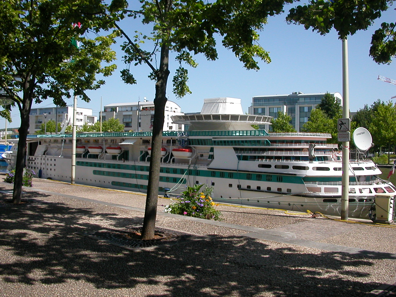 Le Majesty of the Seas (mini) dans le port de Nancy en juillet 2007